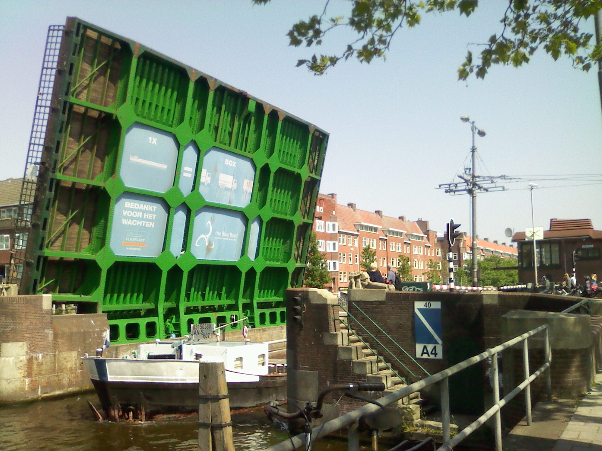 Brug genaamd Overtoomsesluis. Tussen Surinameplein en de Overtoom.